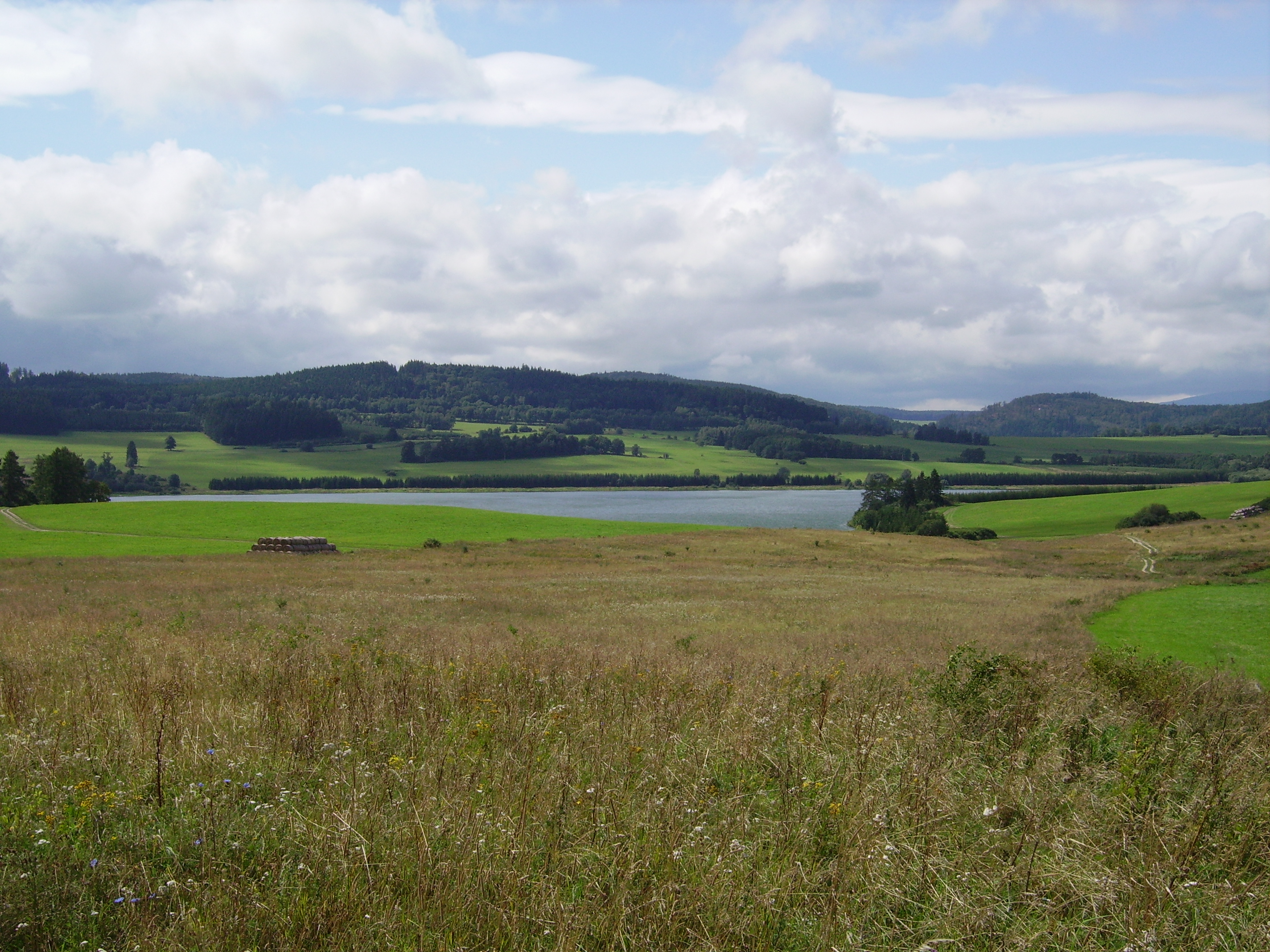 Slezská Harta v Razové poblíž Razovských tufitů